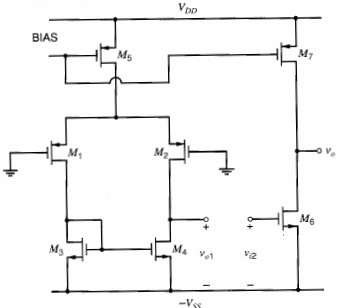 Kolo sa slike 2 sa odvojenim prvim i drugim stepenom